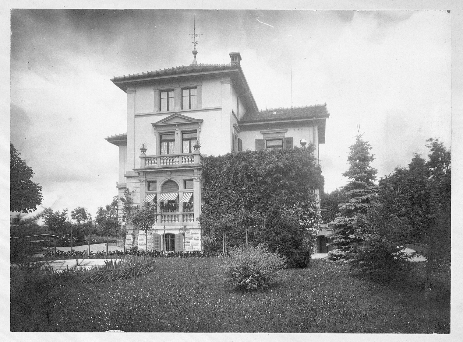 Villa Tusculum in Seeb, Gemeinde Winkel, Kanton Zürich, Schweiz, von Süden.